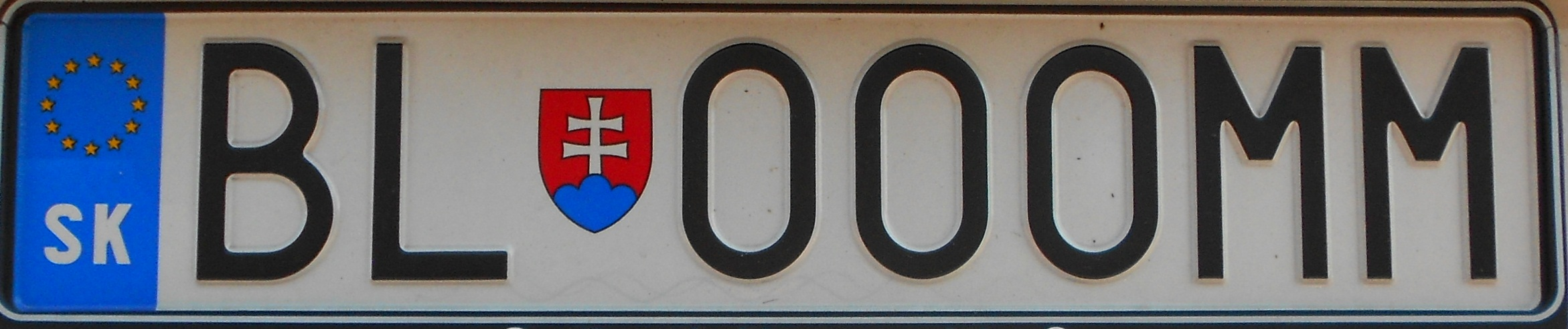 Licence plate Slovakia